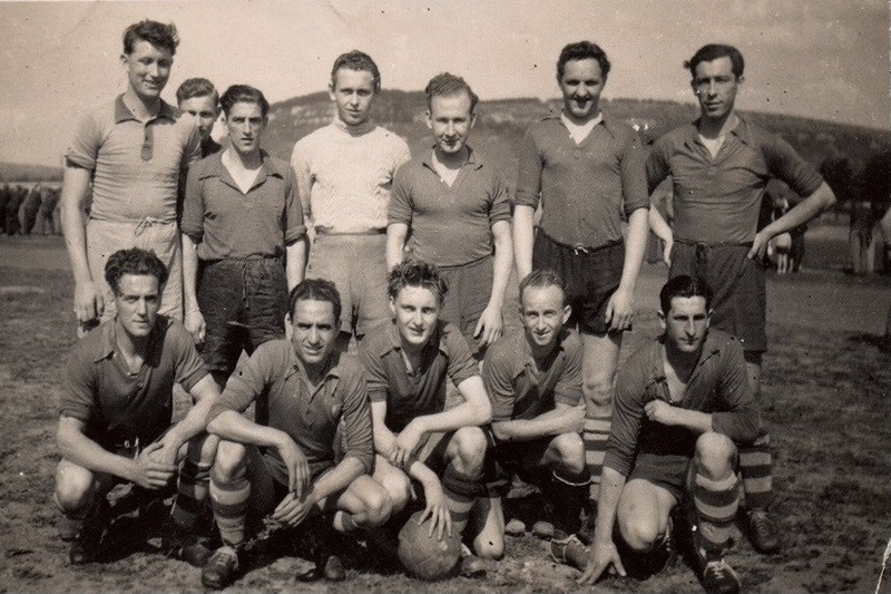 L'équipe A de la section football de l'Union Sportive de Vesoul. Saison 1948-1949 Debout à l'extrême gauche : Georges Hugard Les trois accroupis du côté droit : Cloué, Egli, et Peterhansel Collinet, le gardien en pull blanc, décédera quelques mois plus tard au cours d'un match de football.